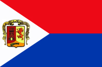 Bandera de Melgar de Fernamental